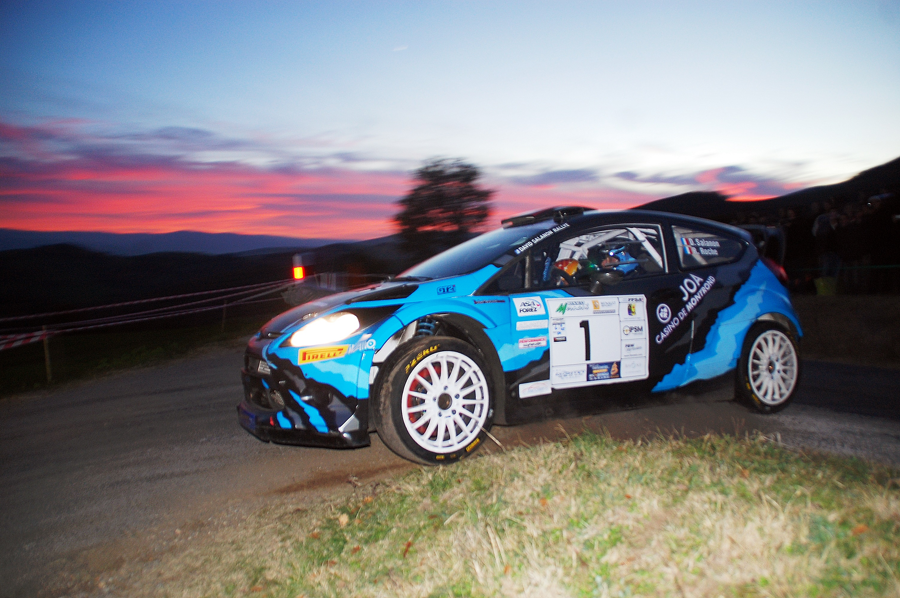 Victoire